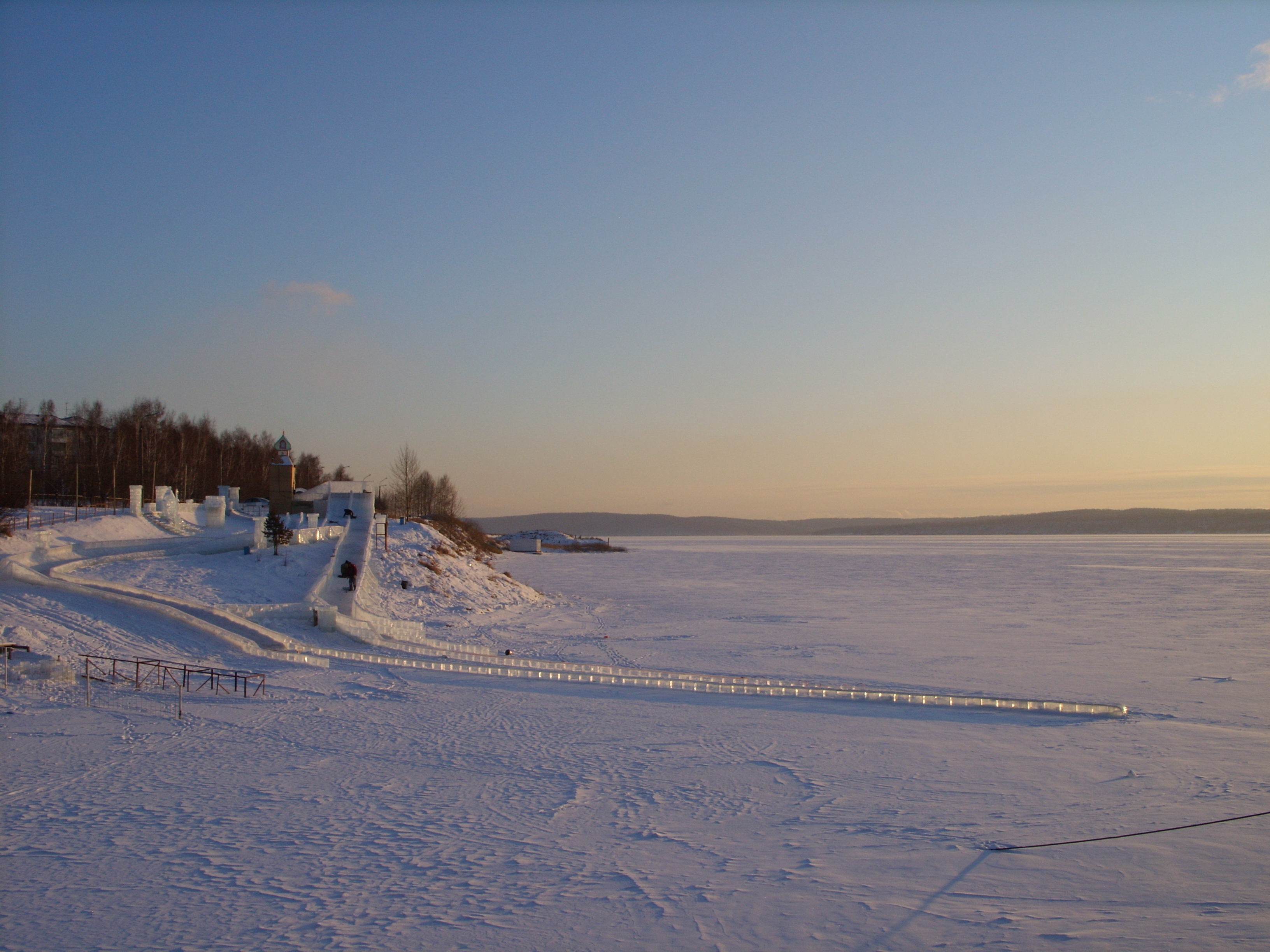 Иркутск, Россия